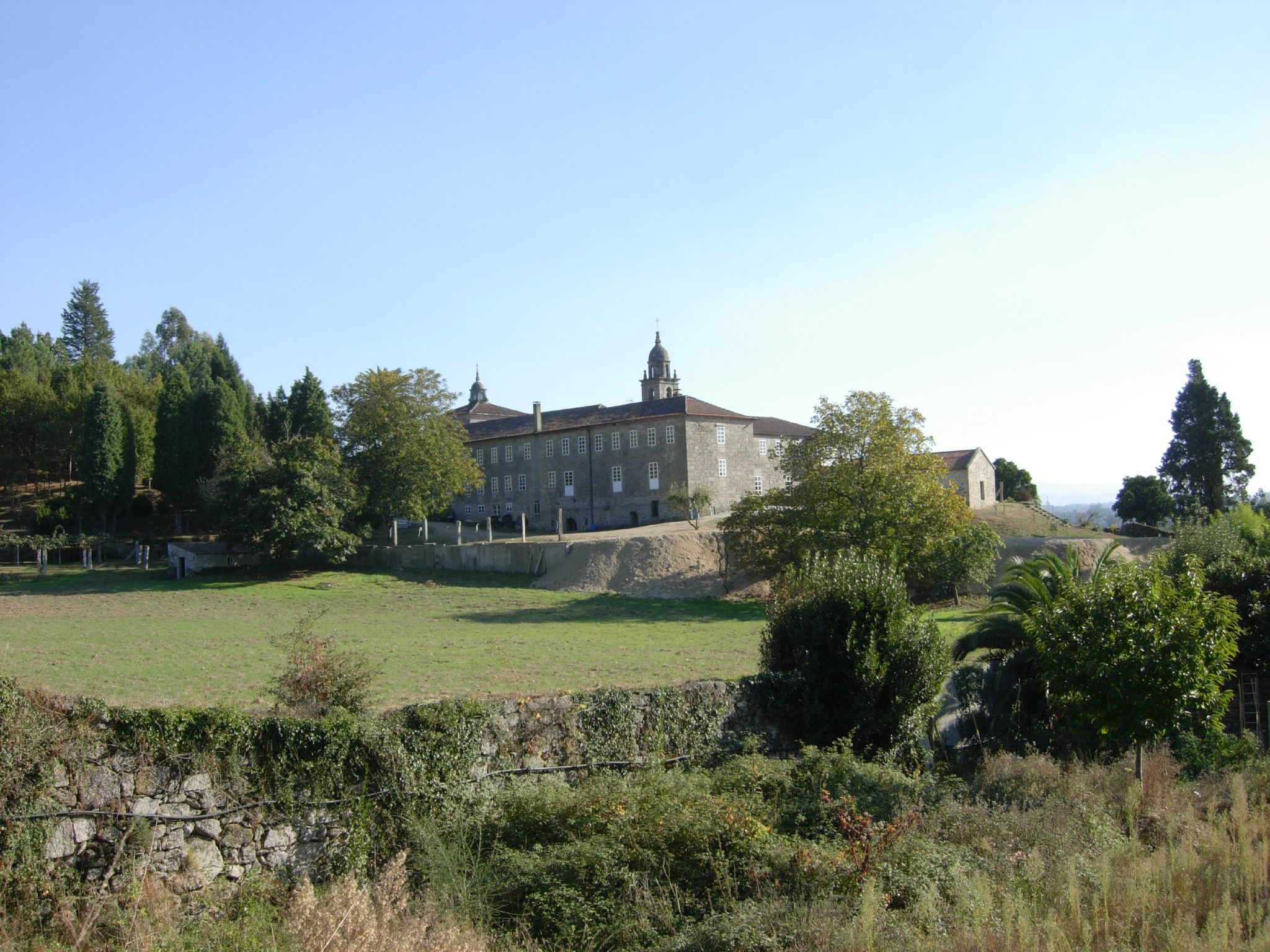 El Convento franciscano de San Diego de Canedo es un gran complejo monástico construido en el siglo XVIII a raiz de la donación del pazo de Canedo por parte de Diego Sarmiento de Soutomaior a los franciscanos que vieron su original convento destruido un siglo antes en la guerra con Portugal.